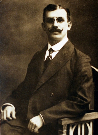 Уладзіслаў Галубок. Фотаздымак перадала Арсеню Лісу Людвіка Антонаўна Войцікава